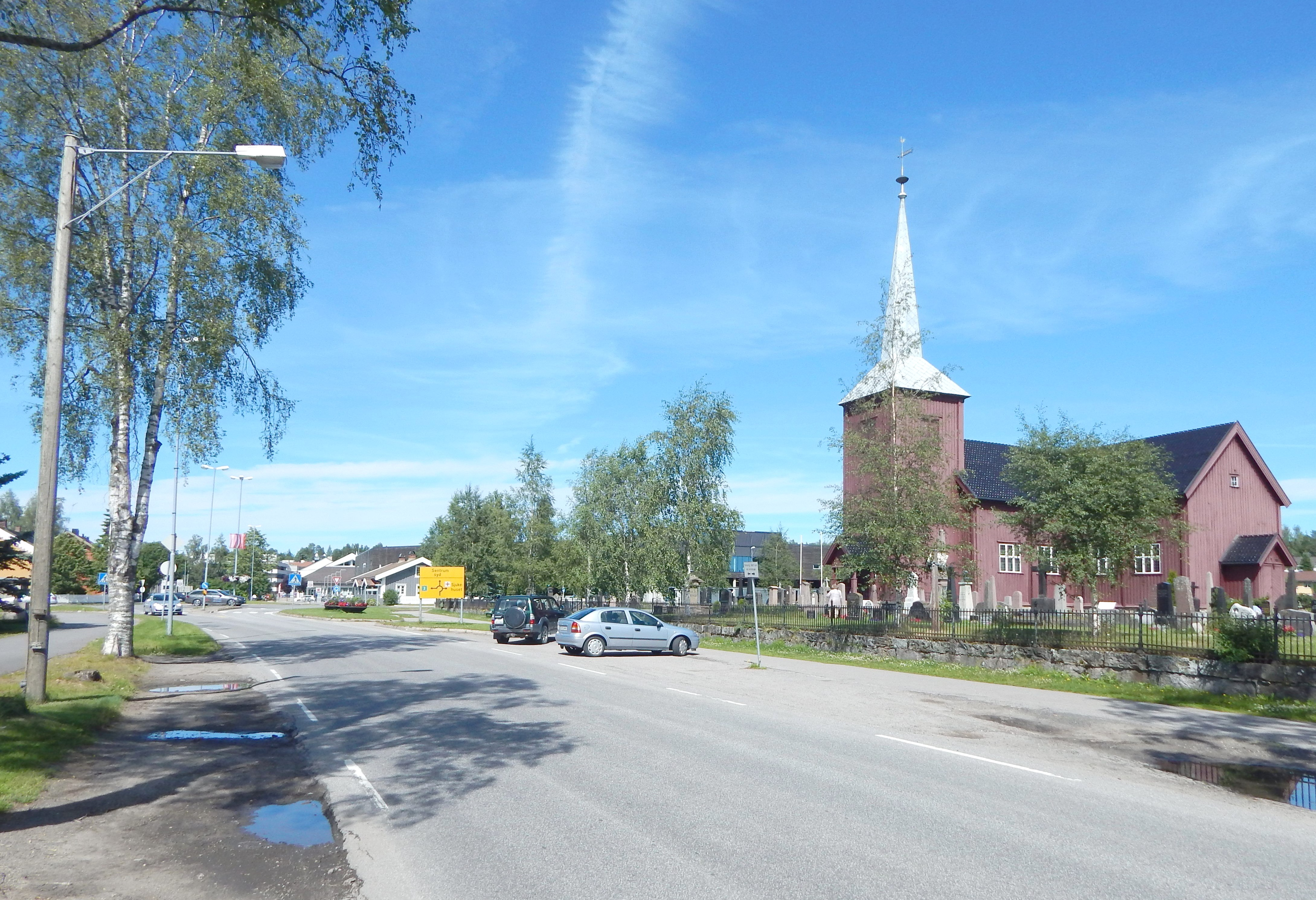 Storgata på Elverum (FV554) går forbi kirken.